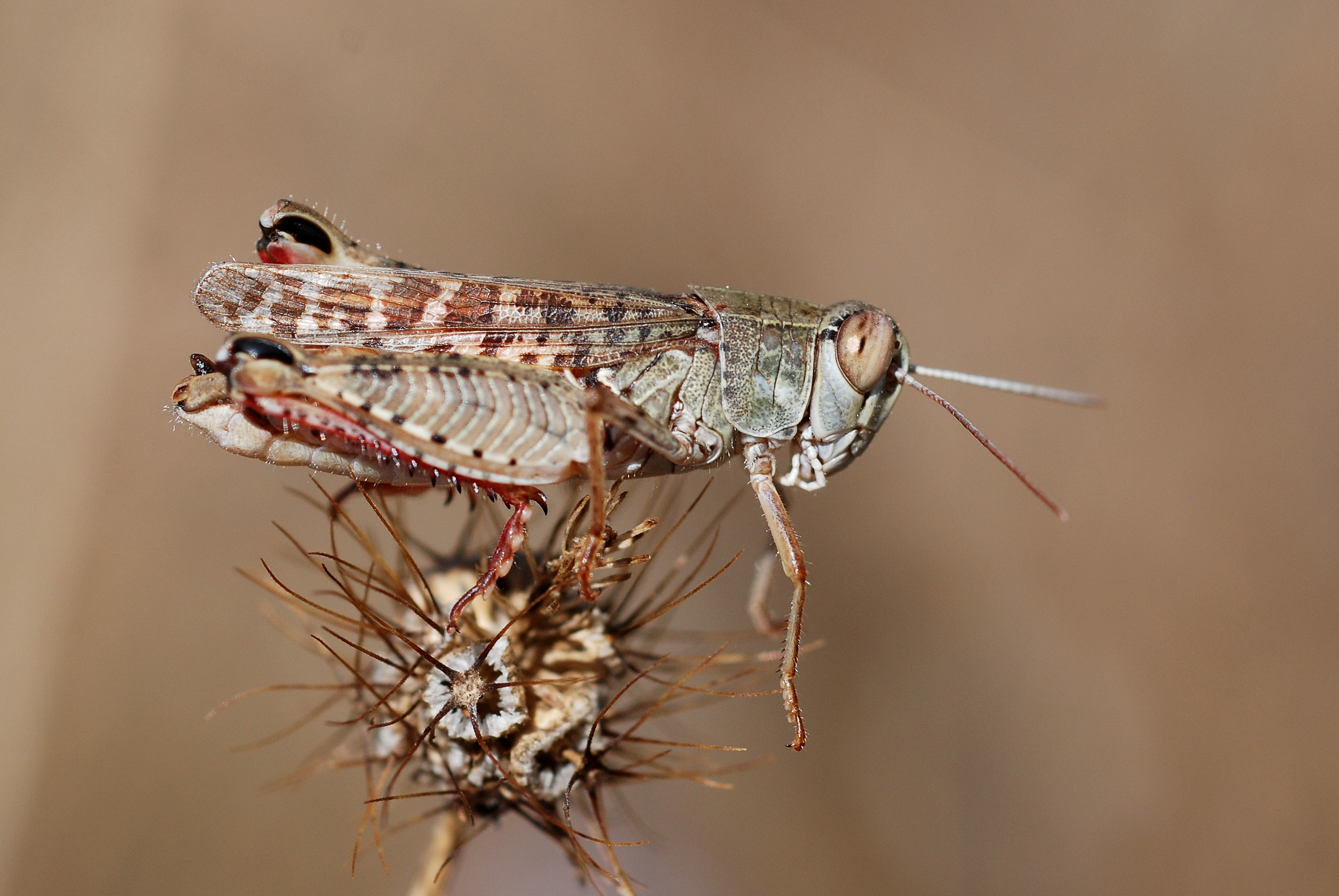 Calliptamus italicus male